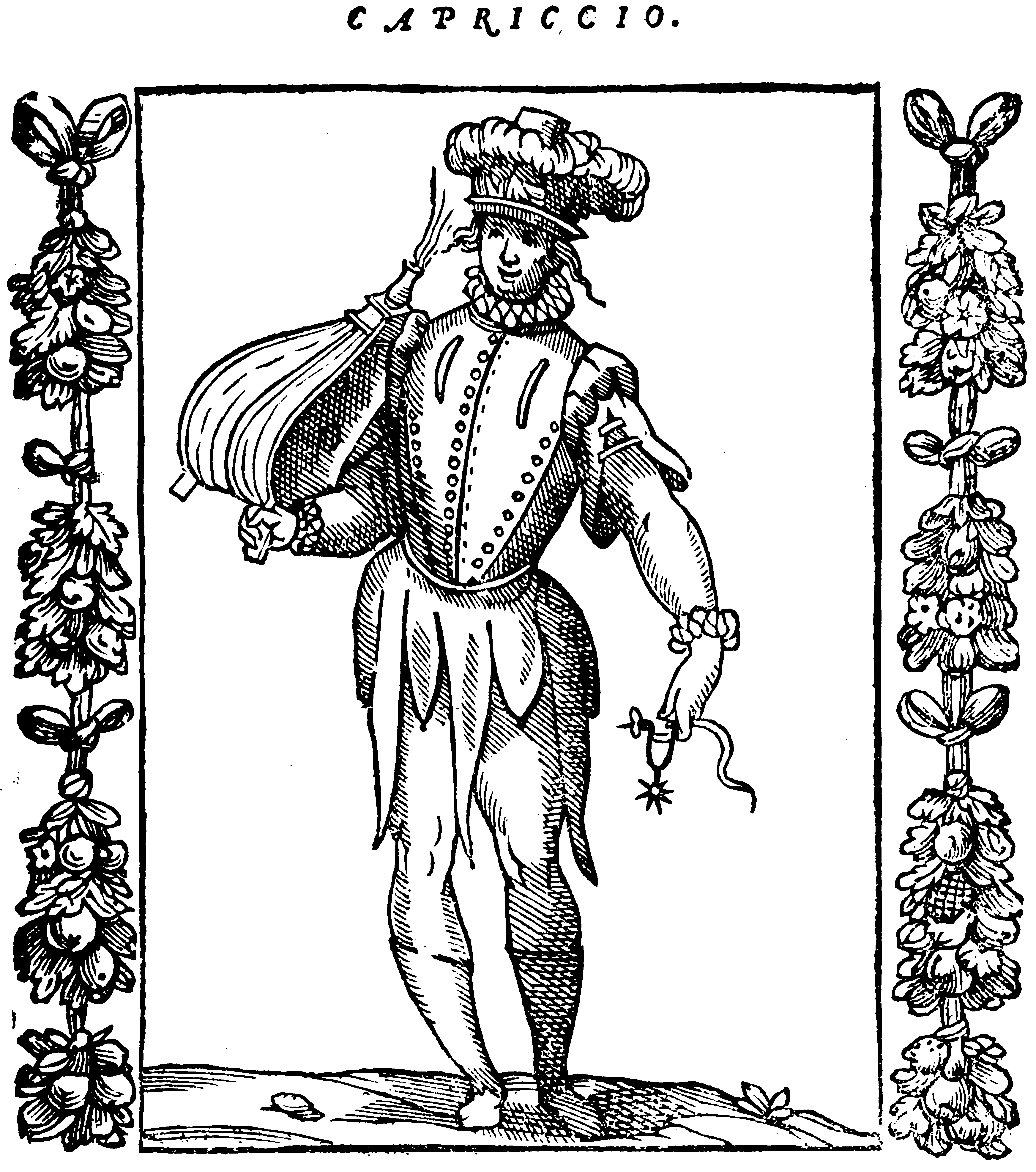 Raffigurazione del Capriccio nell'edizione di Tozzi, 1624, Padova